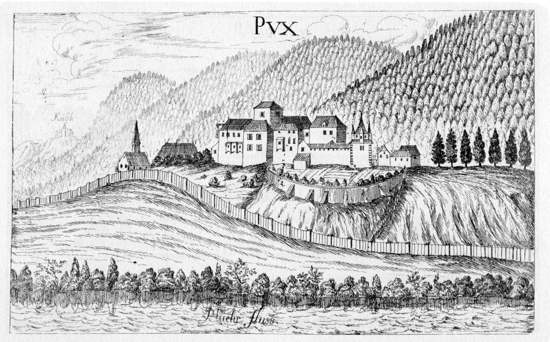 Vischerstich des Schlosses Pux